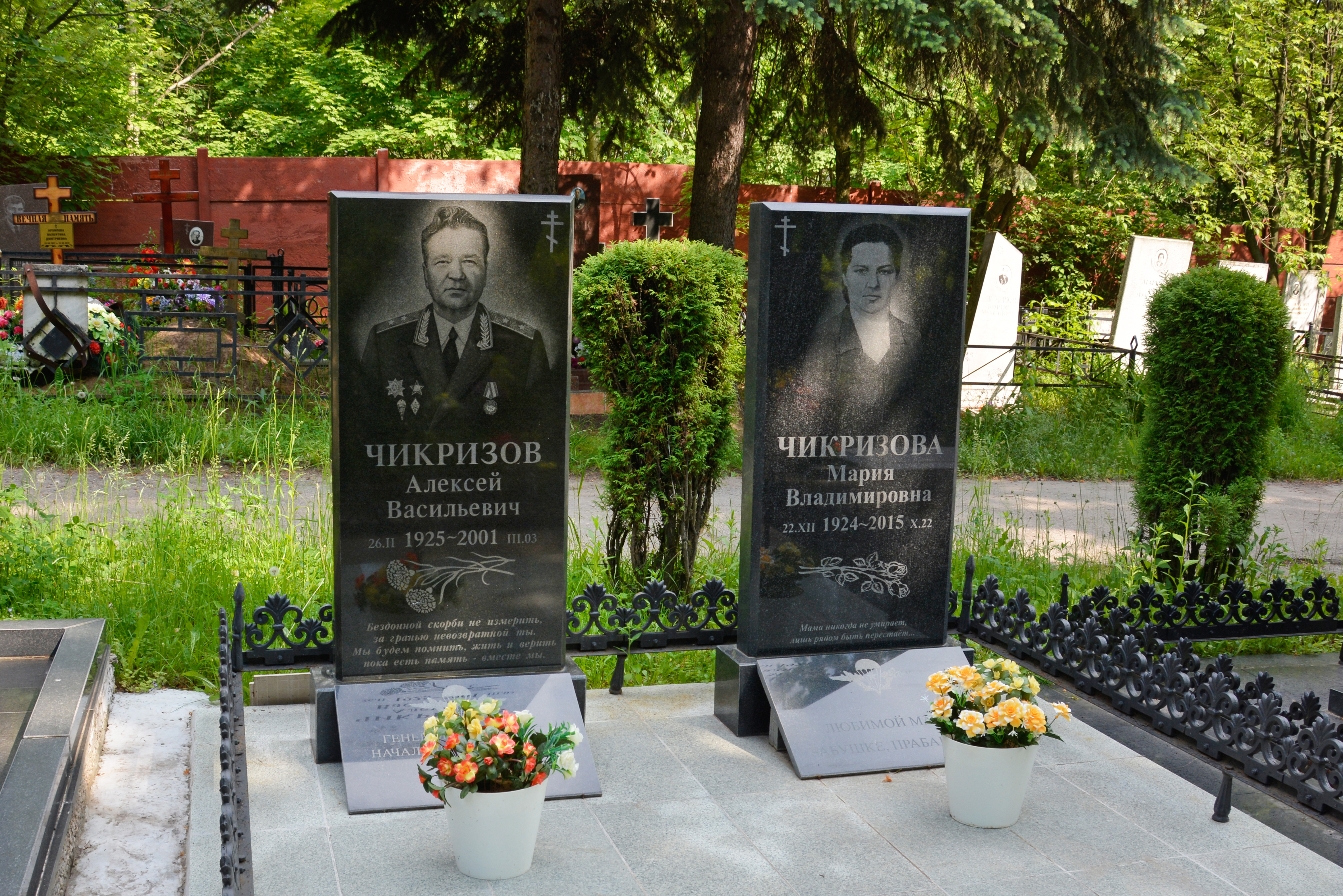 Могила генерал-лейтенанта Чикризова Алексея Васильевича и Чикризовой Марии Владимировны на Новогражданском кладбище г. Рязани. 10 июня 2020 г.